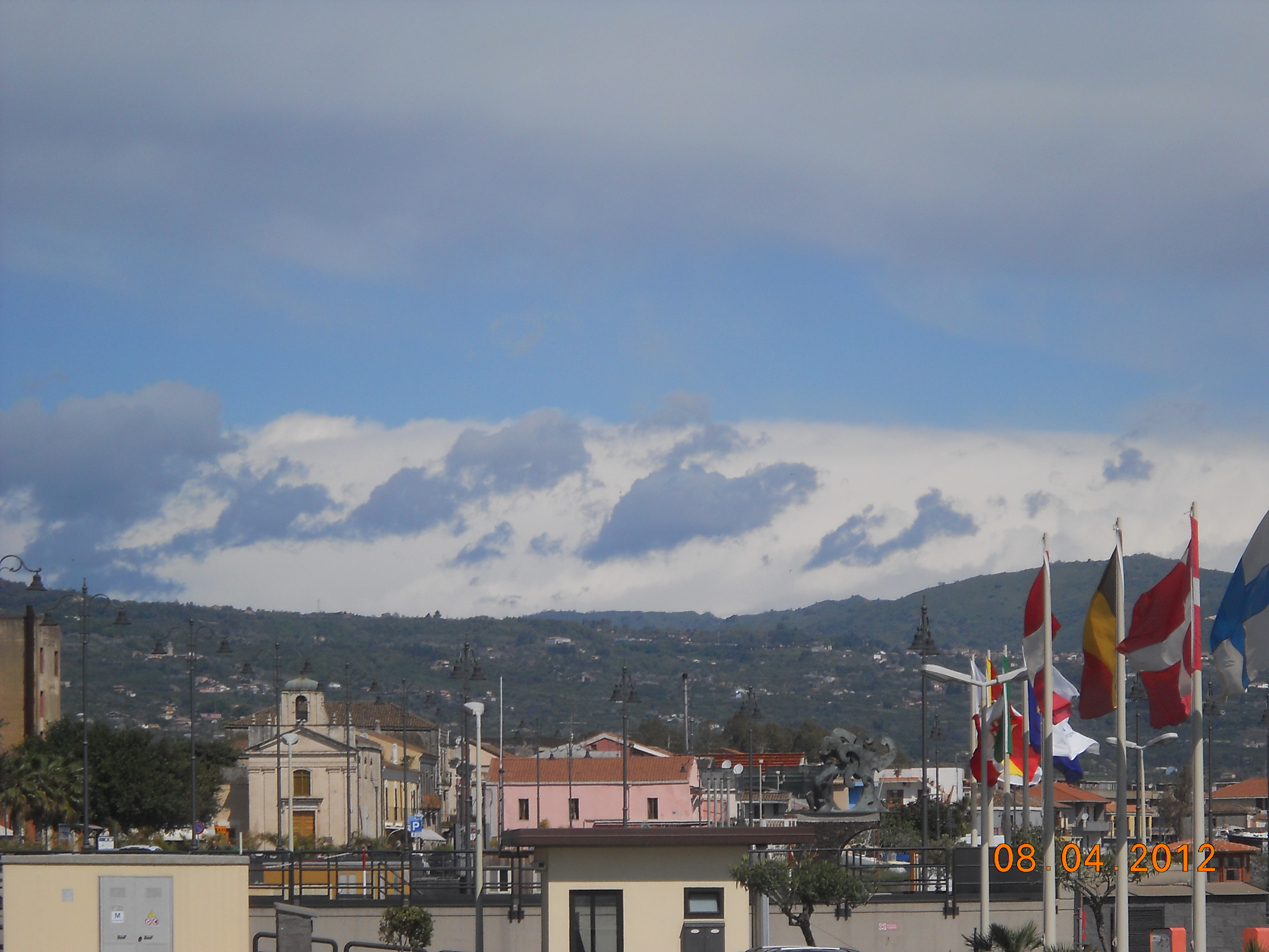 Chiesa della Madonna della Lettera e Peloritani a Riposto